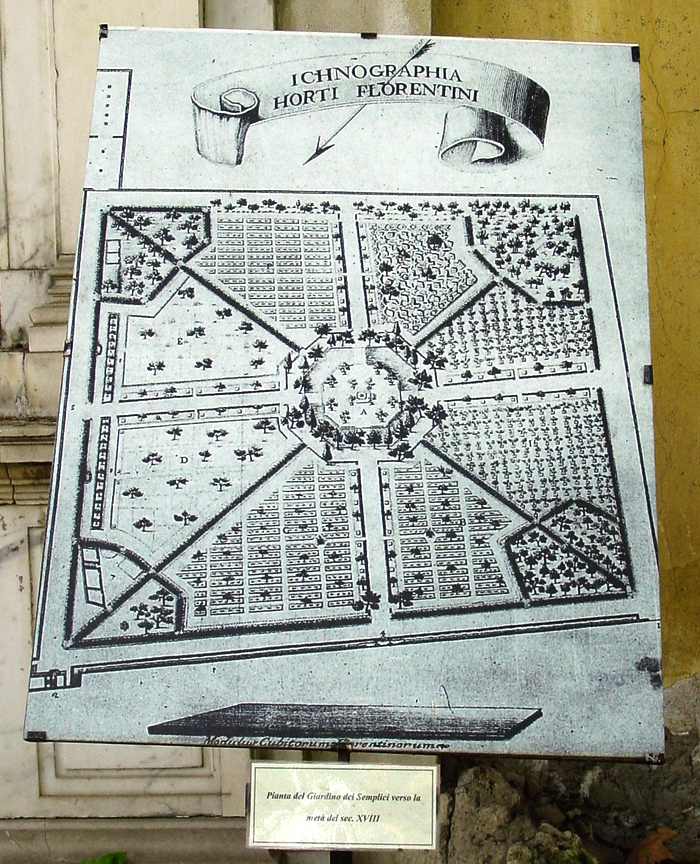 Giardino dei Semplici (Florence, Italy) - Historical map